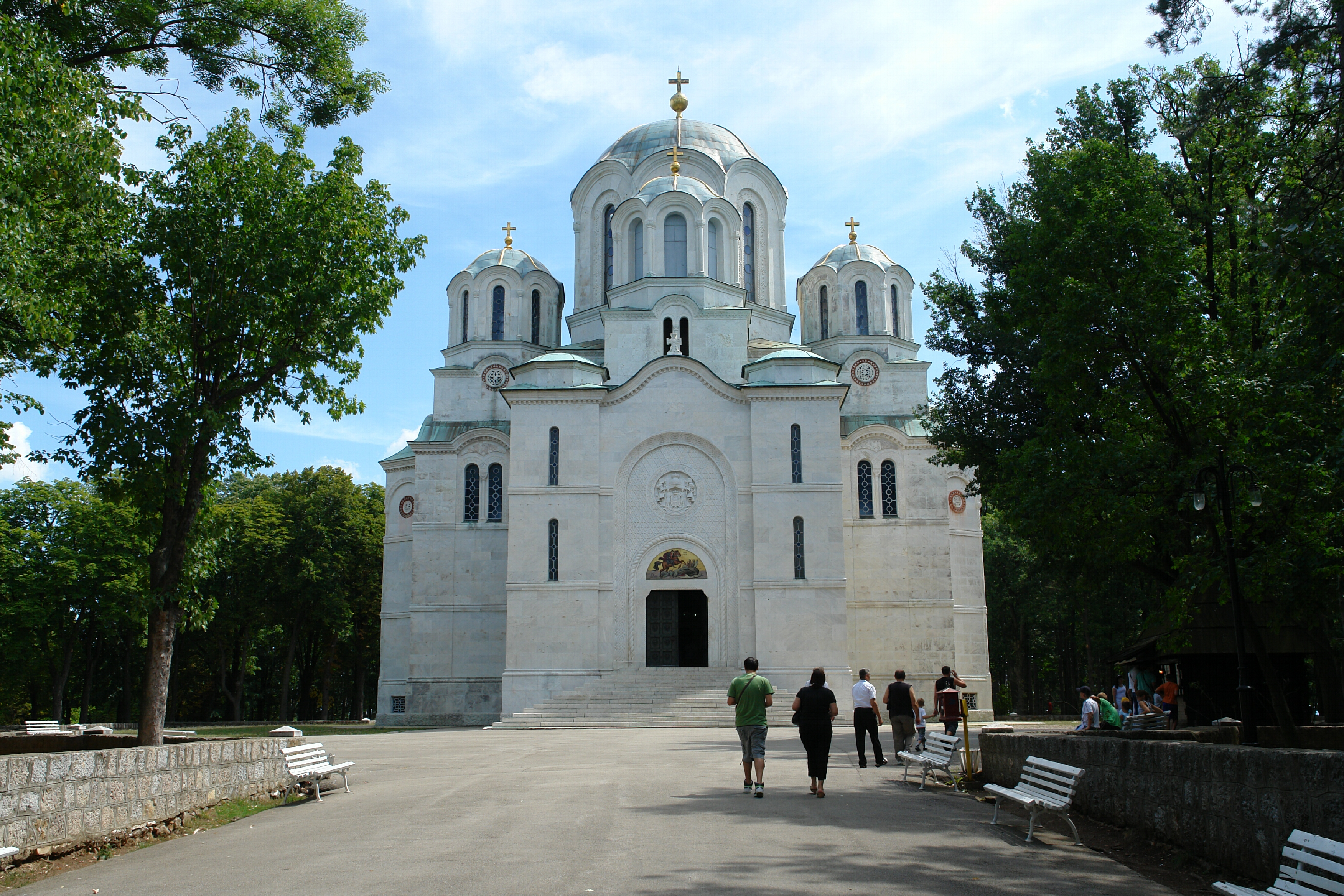 Oplenac